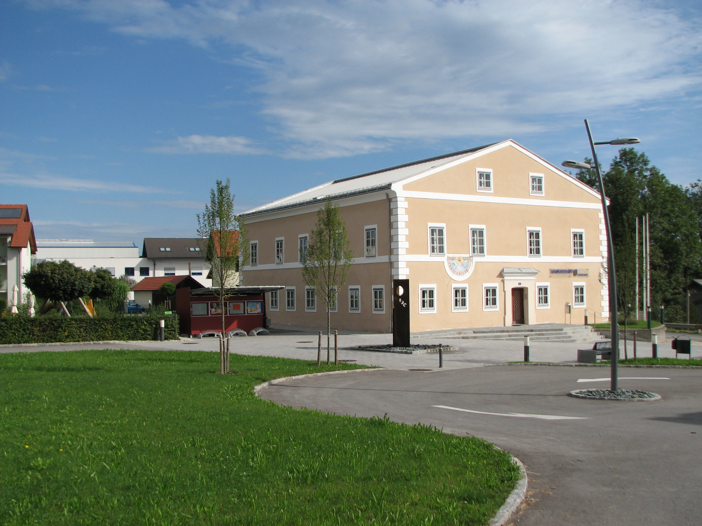 Ehem. Pfarrhof, Gemeindeamt